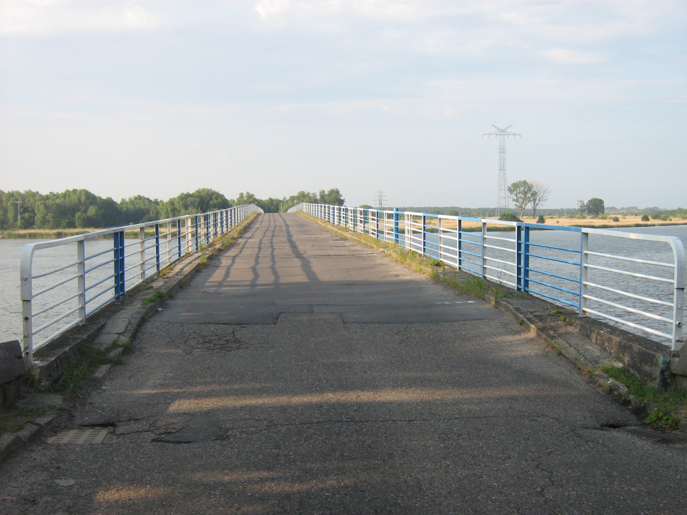 Most Piastowski w Świnoujśćiu